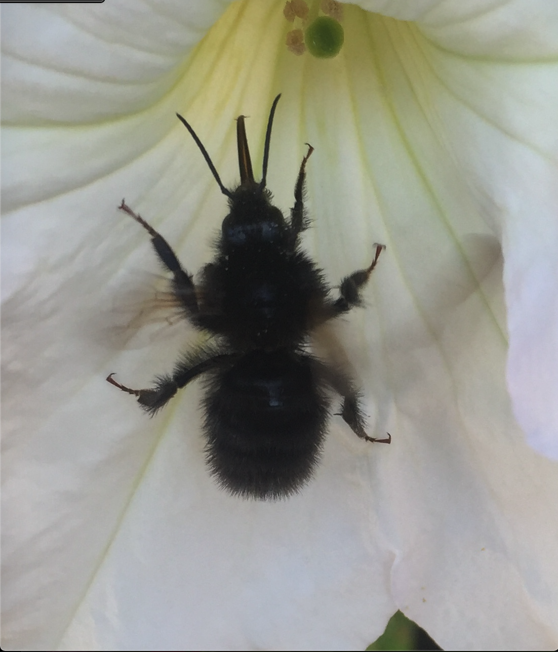 Melanistisk trädgårdshumla